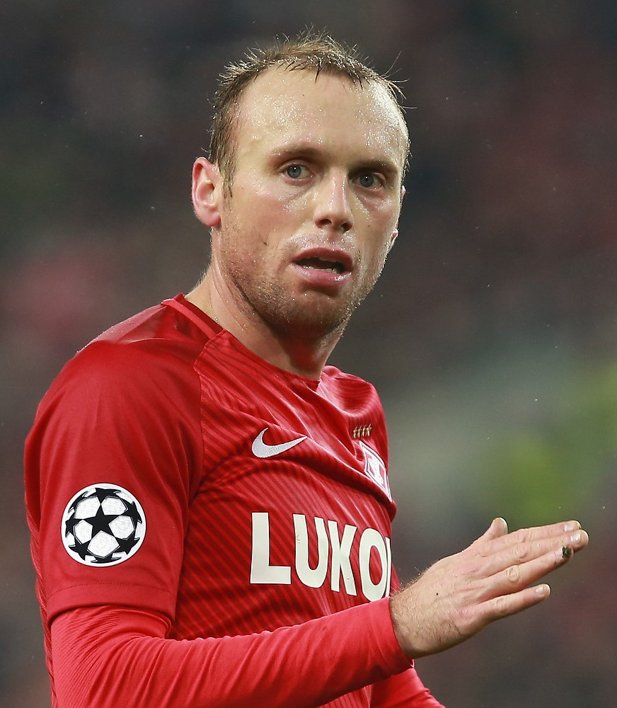 Denis Glushakov